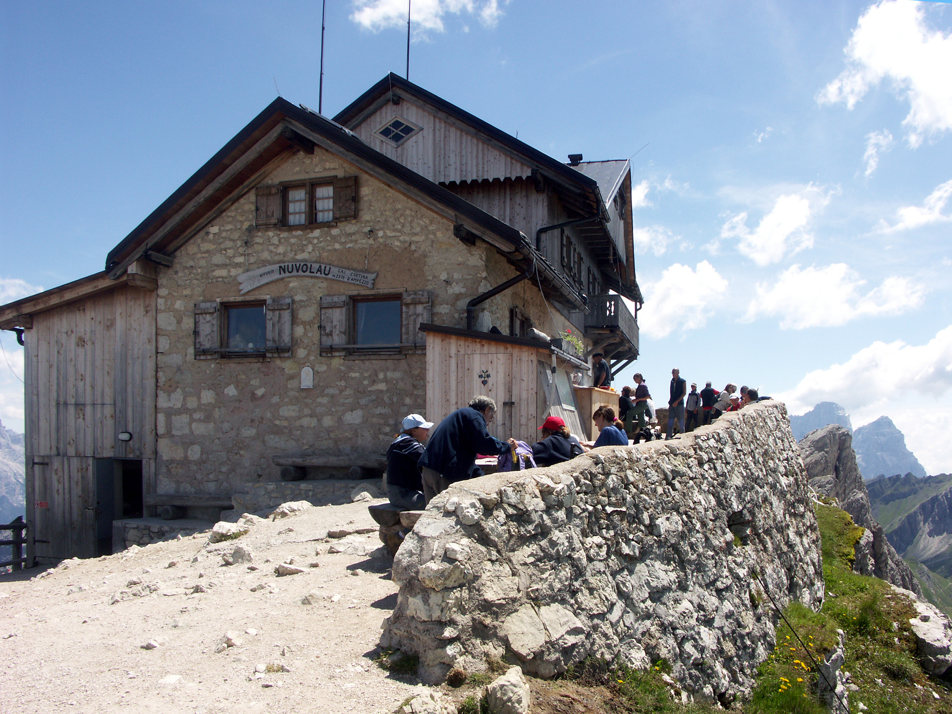 Italien, Dolomiten, Nuvolau-Hütte (Rifugio Nuvolau) auf dem gleichnamigen Dolomitgipfel